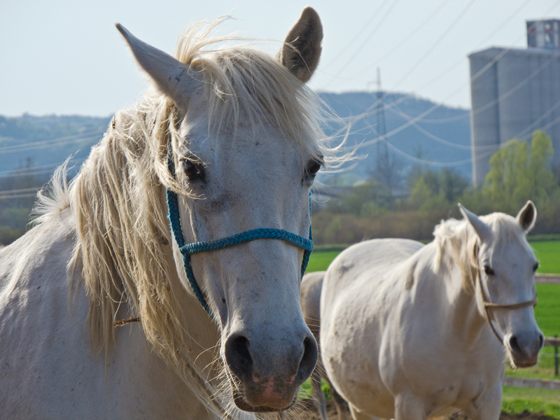 Lipik Lipicanac